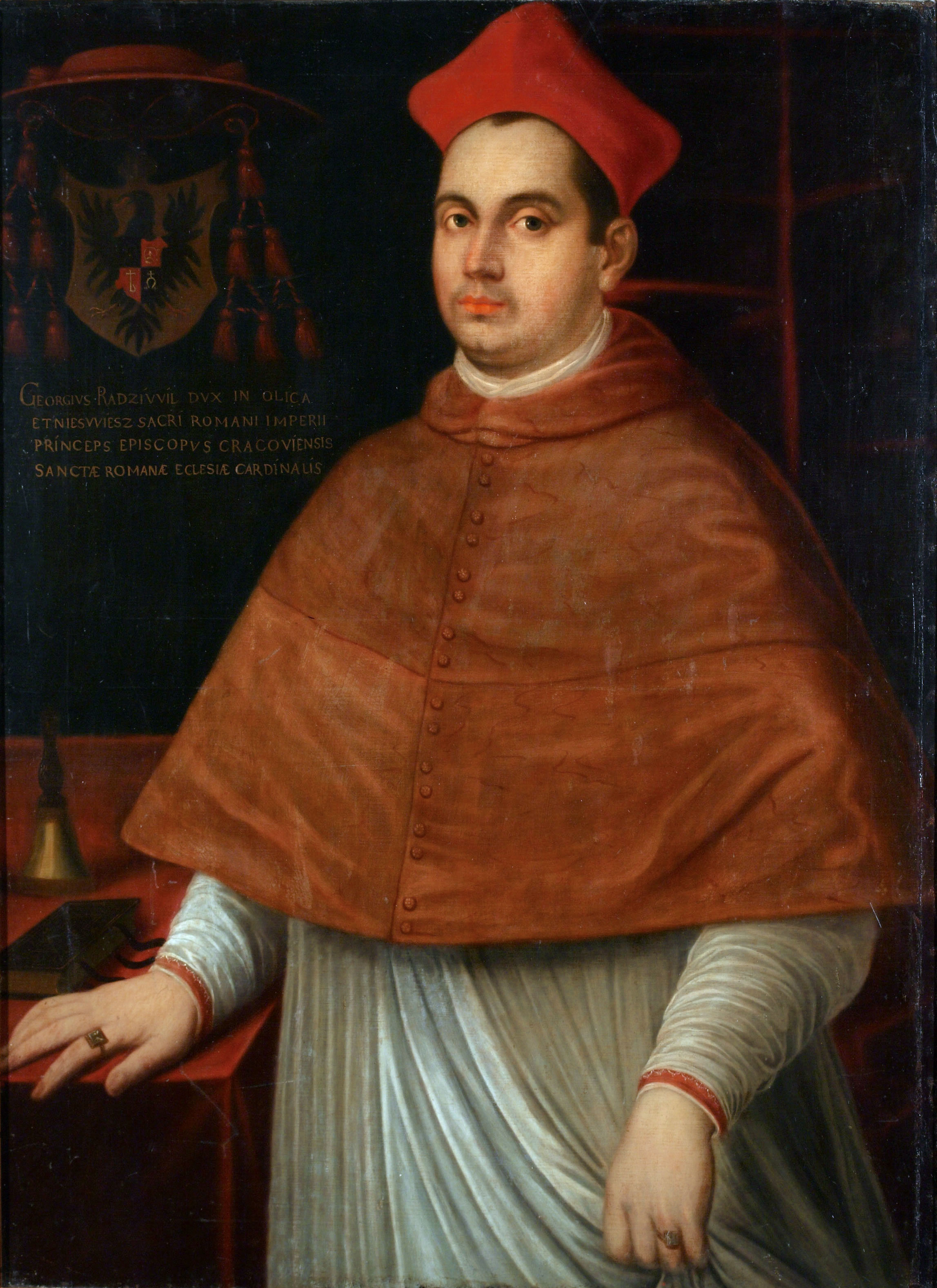 Беларуская (тарашкевіца): Партрэт біскупа Юрыя Радзівіла (Jury Radzivił)